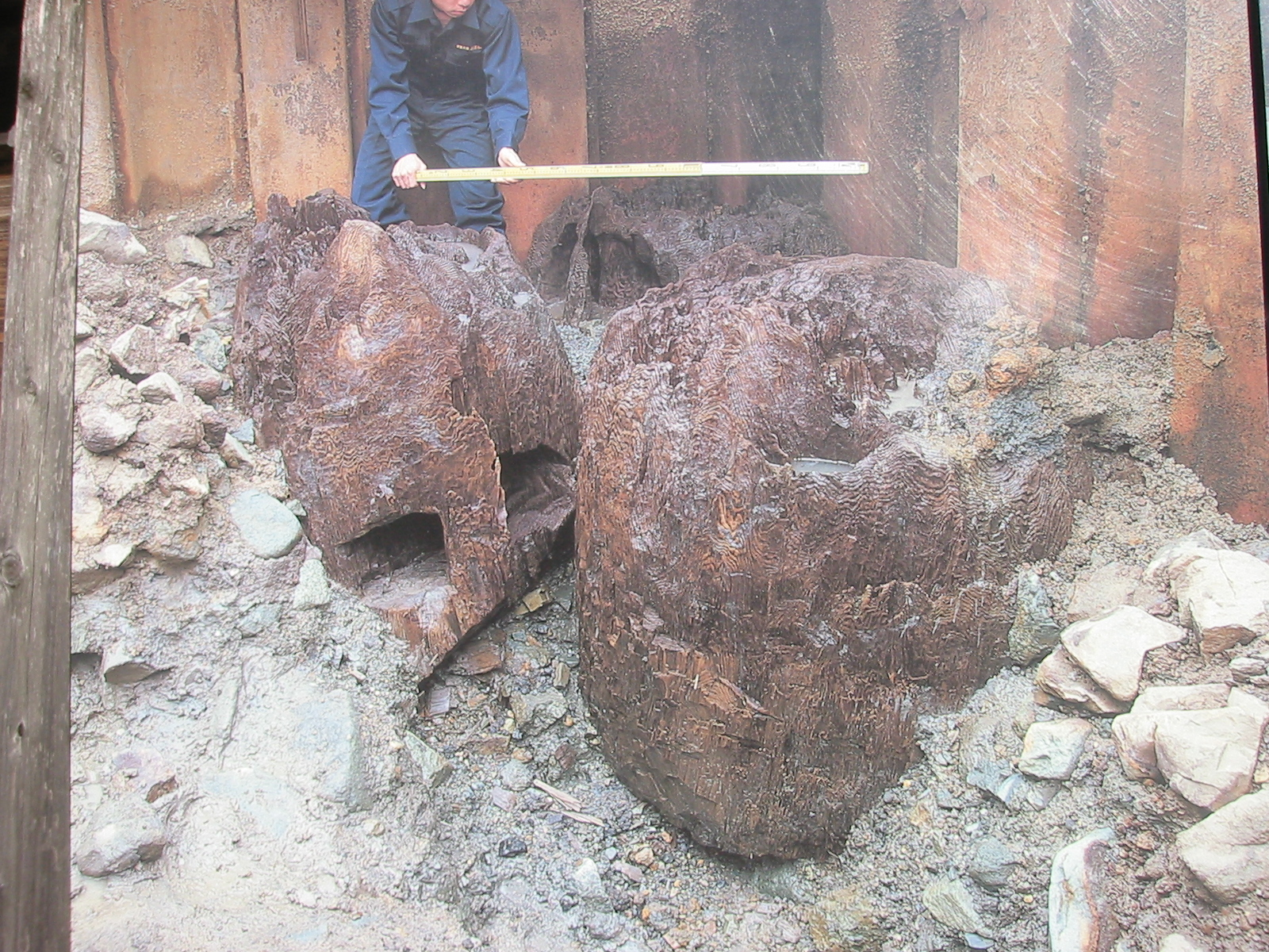 出雲大社 太古の柱 案内板より